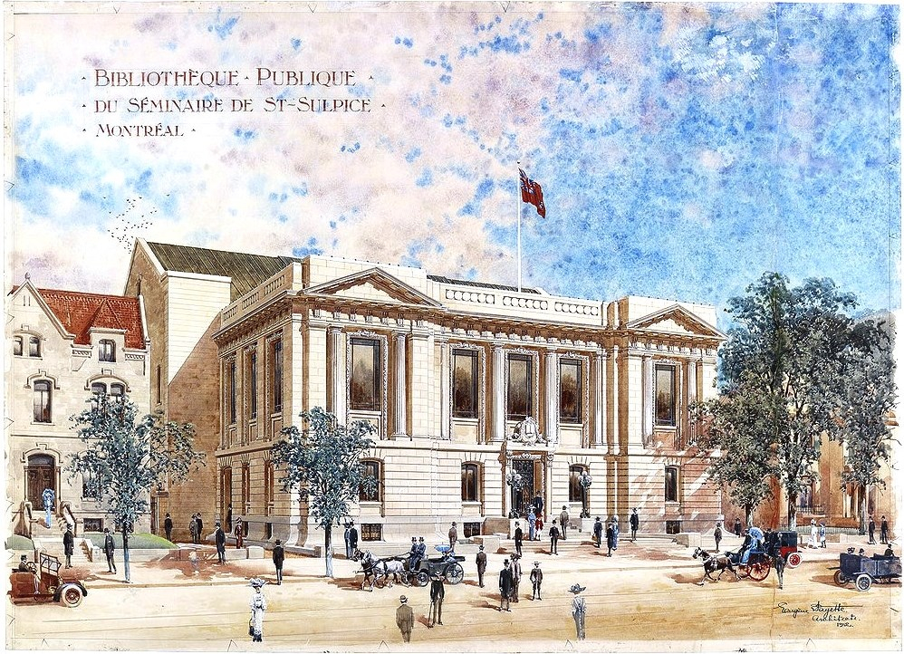 Bibliothèque Publique du Séminaire de St-Sulpice, Montréal